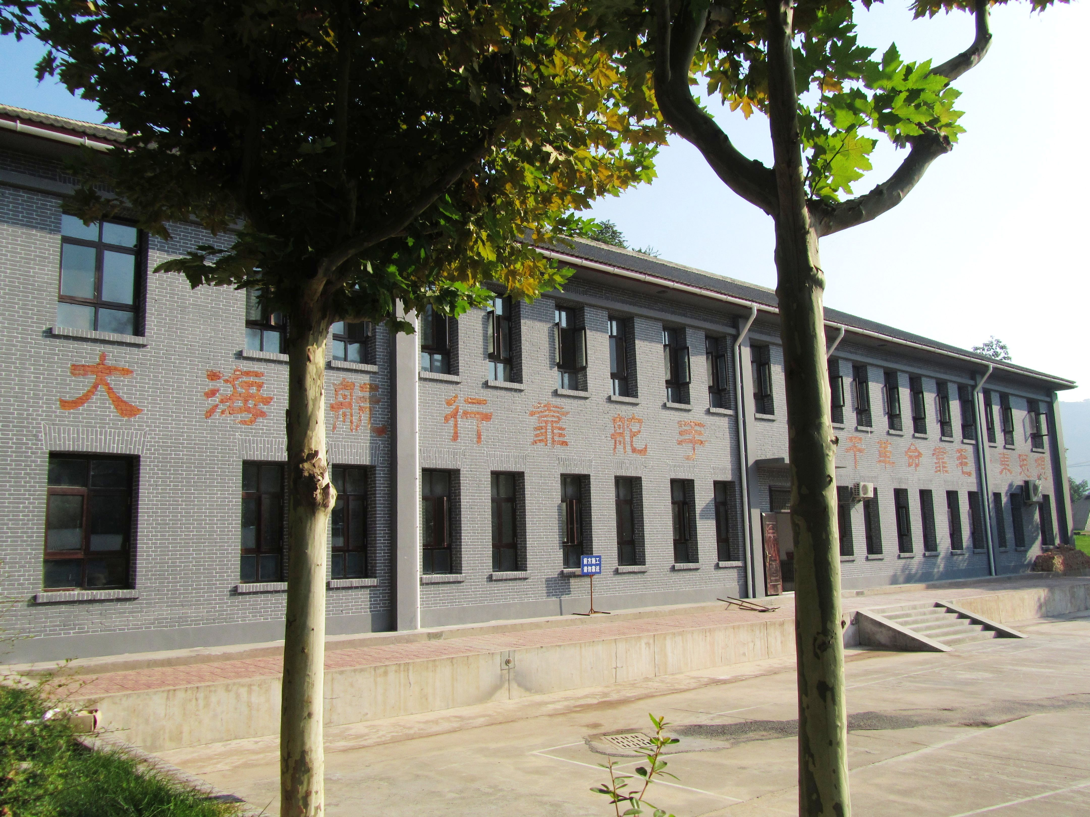 宝鸡北首岭遗址博物馆办公楼。